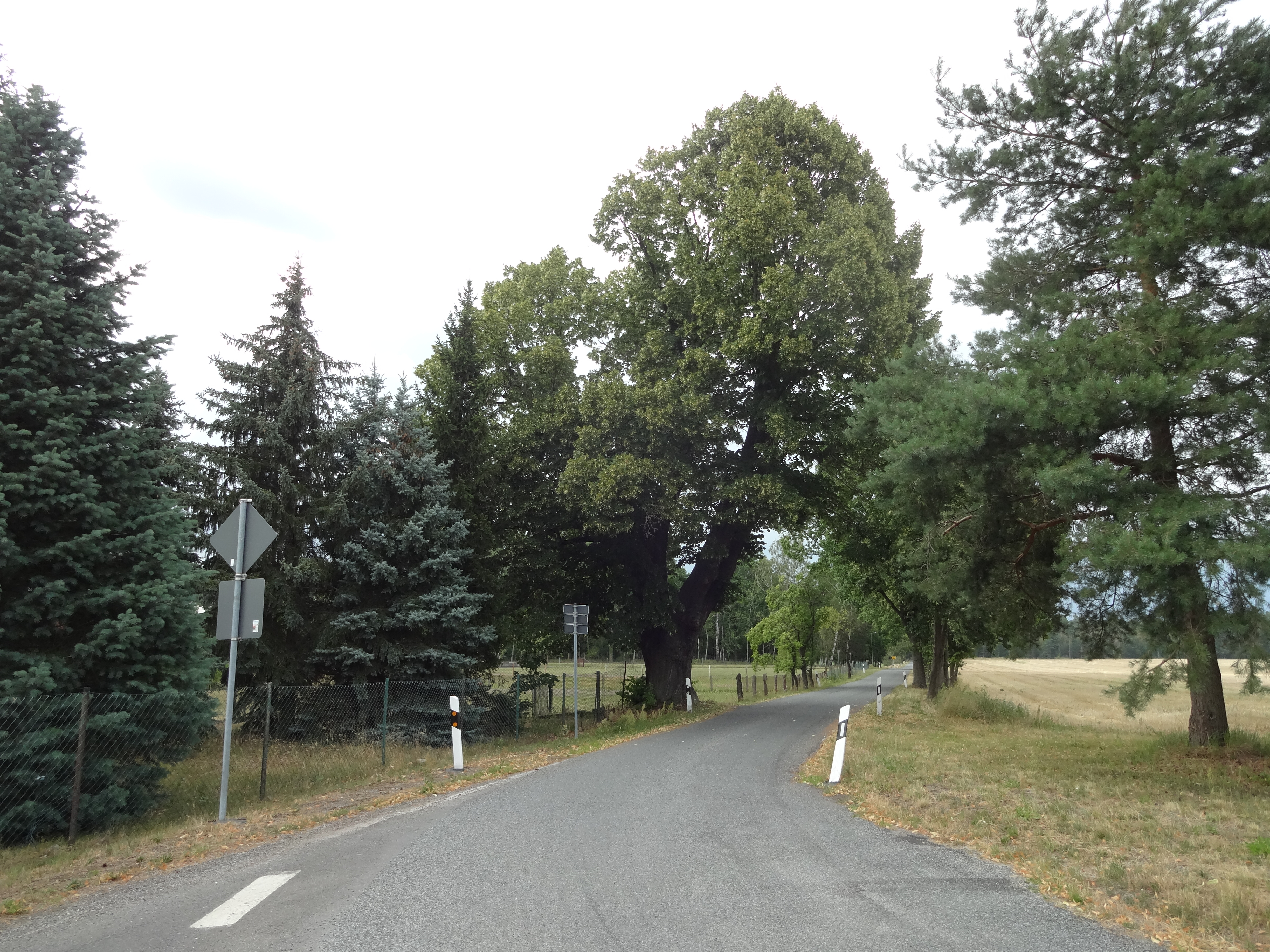 Naturdenkmal Sommerlinde an Straßenrand am Dorfanger 20 in Rutzkau